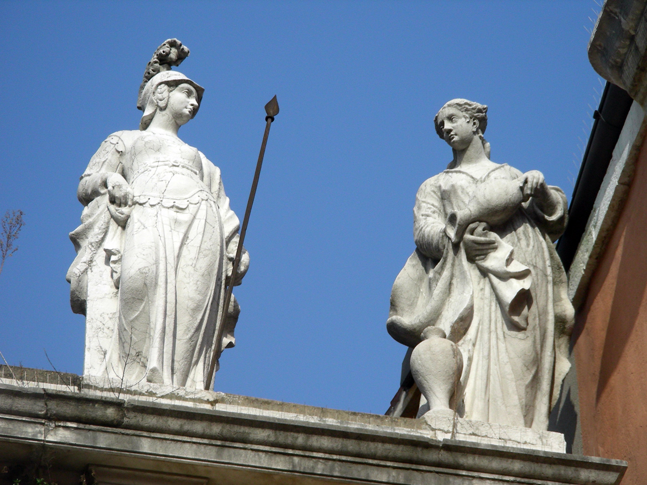 Padova, oratorio di Santa Margherita di Antiochia di Pisidia, statue di Virtù cardinali di Francesco Bonazza (XVIII secolo) (lato destro)